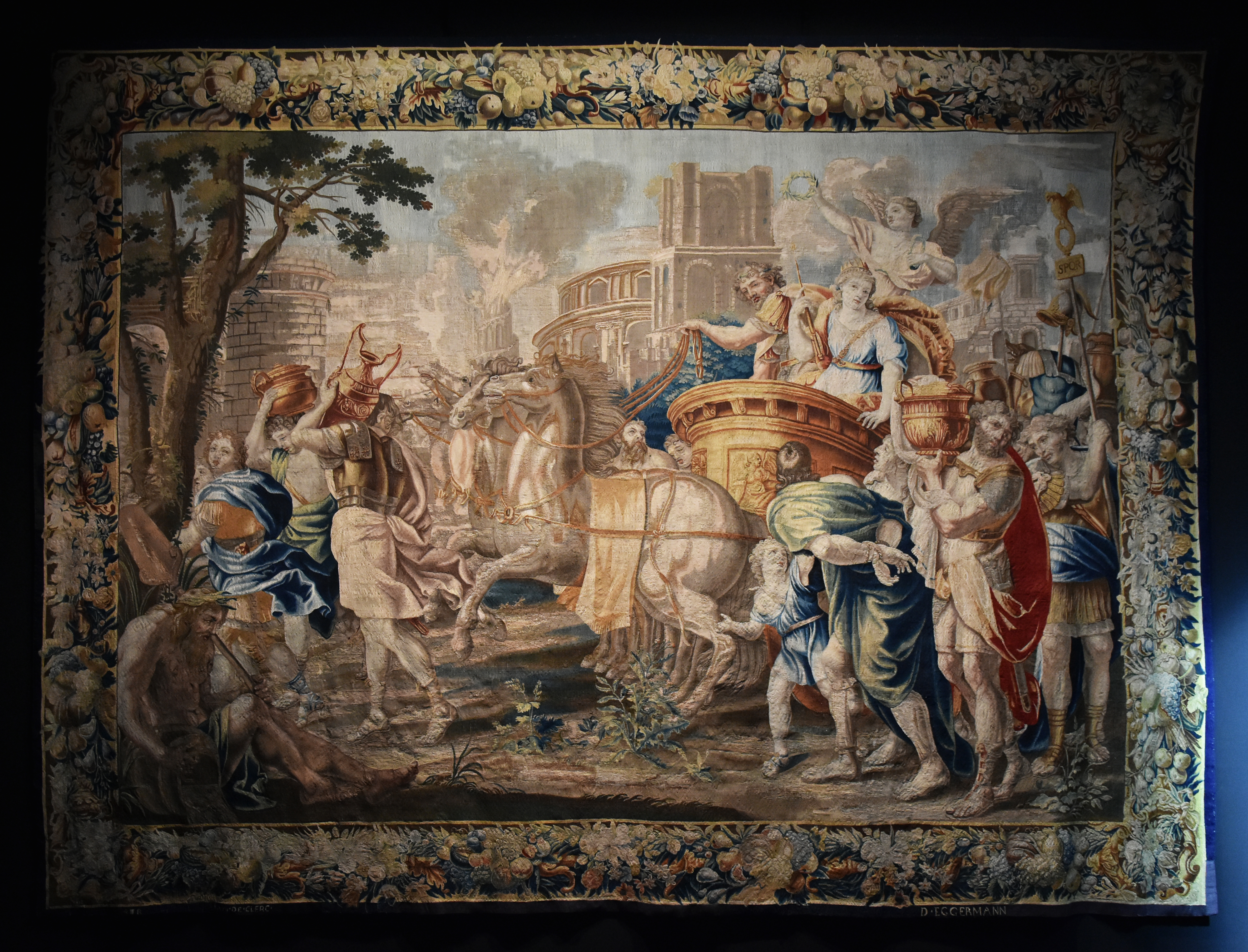 Wandtapijt De Triomf van Cleopatra (Brussel) KBS Brafa 2019 31-01-2019